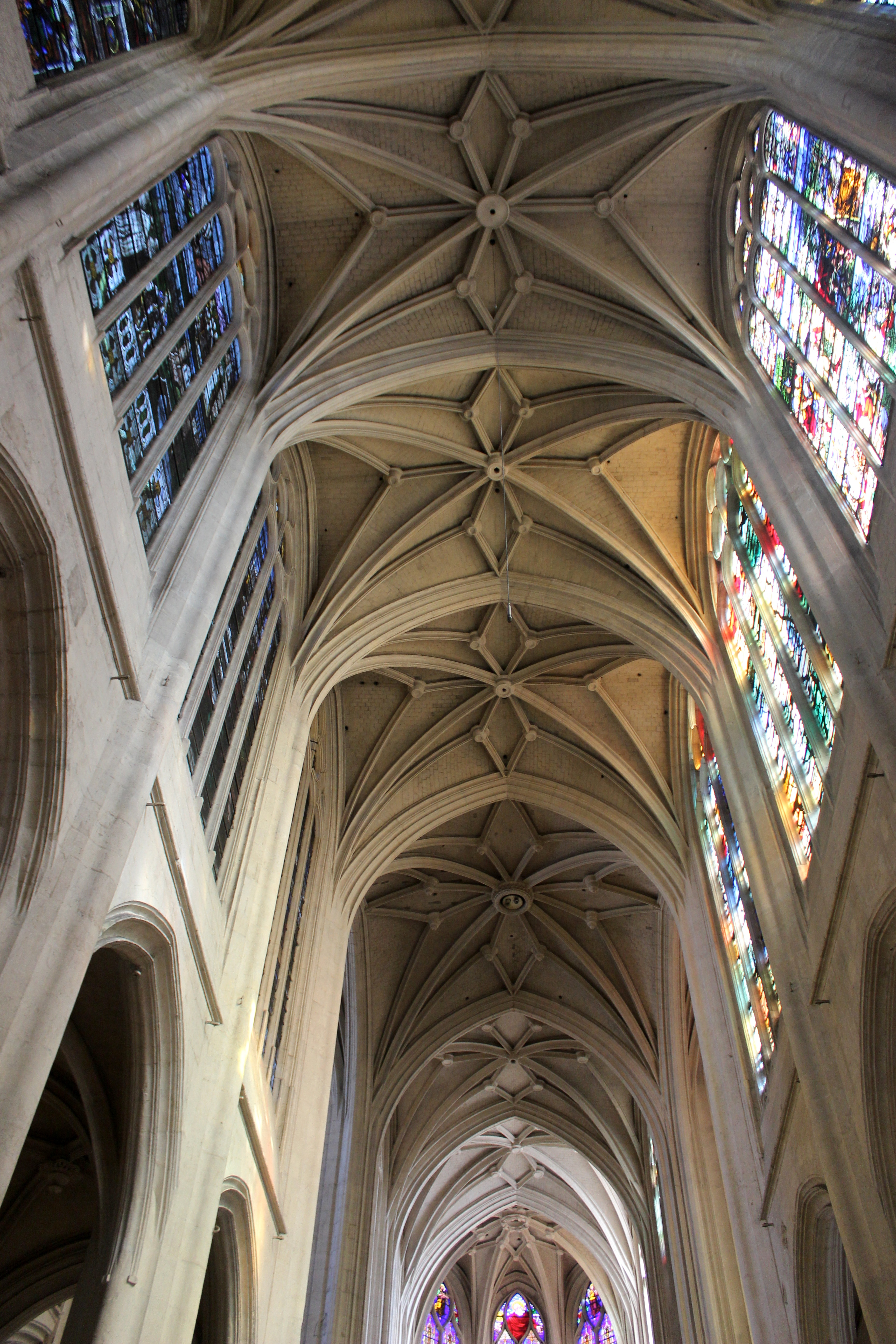 París, Saint Gervais-Saint Protais.